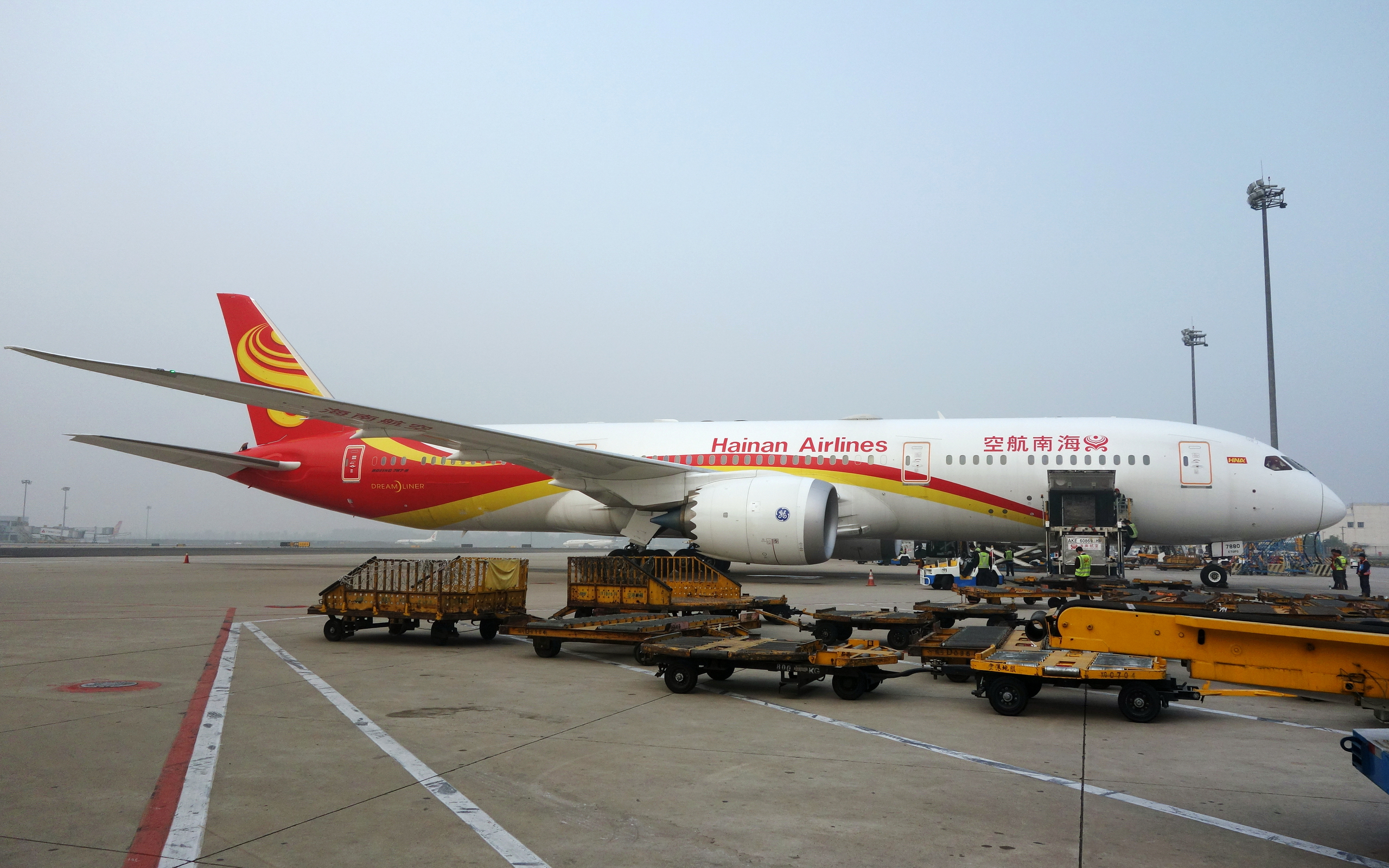 海南航空引进运营的波音787-9客机（机号B-7880）停放在北京首都国际机场